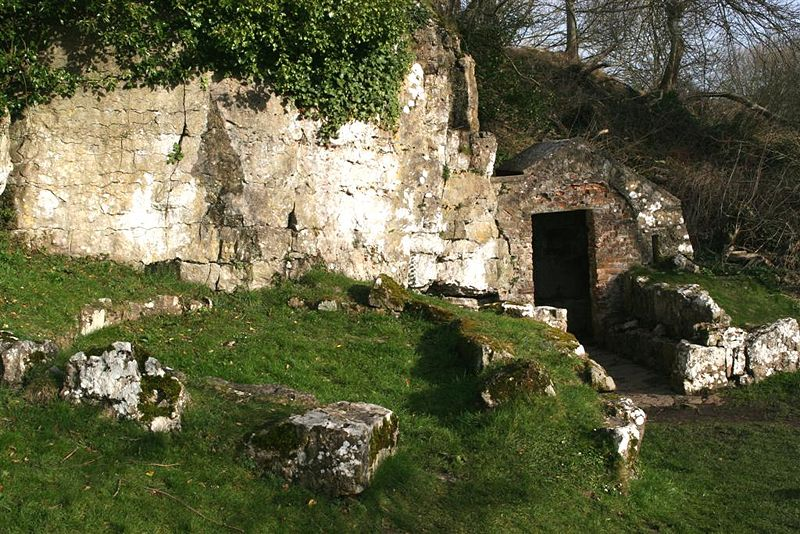 Ffynnon Seiriol, Pemnon, Ynys Mon Seiriol's Well, Penmon, Anglesey